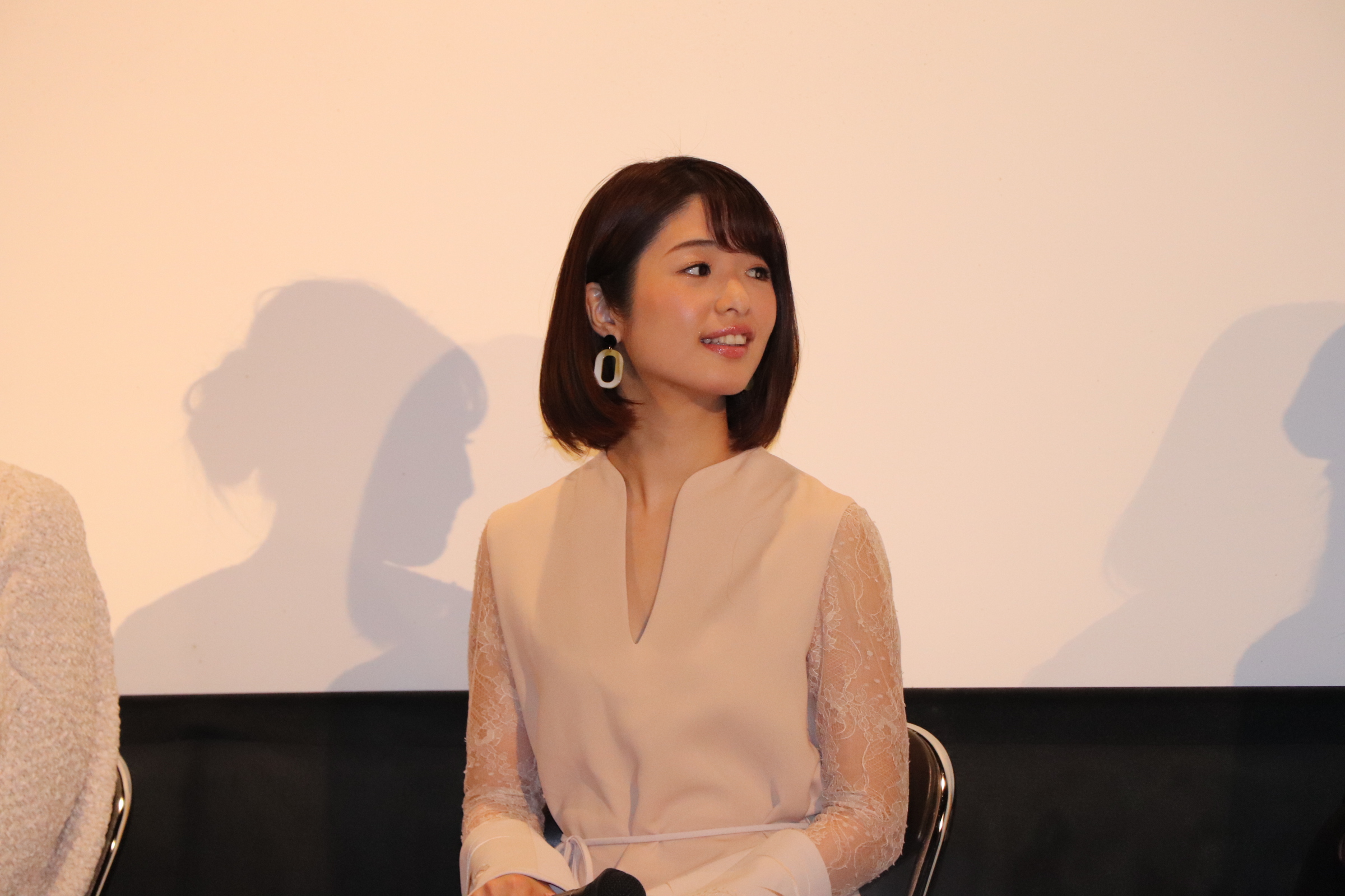 上野オークラ劇場舞台挨拶